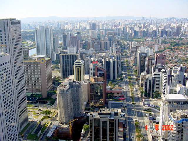 Avenida Engenheiro Luís Carlos Berrini